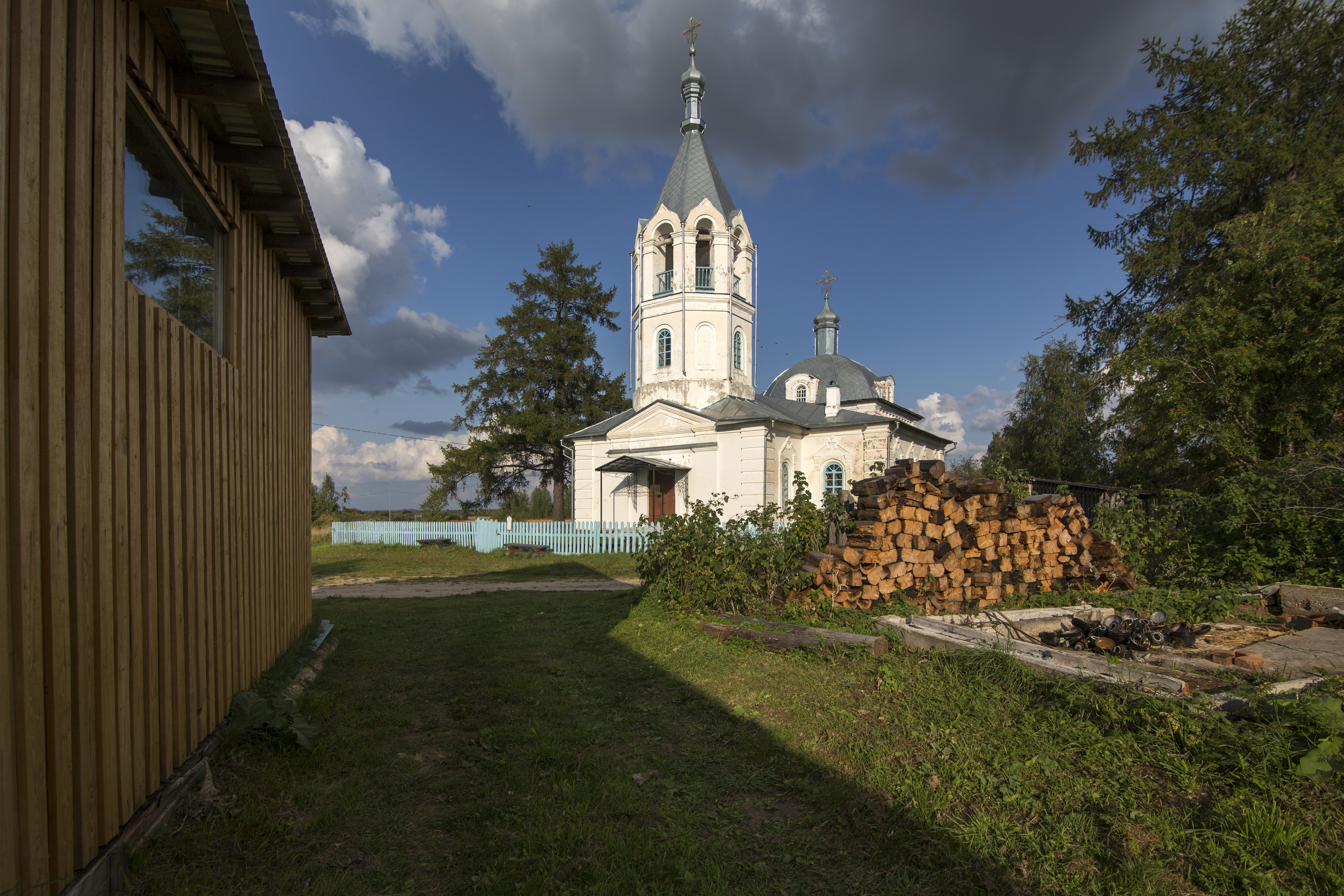 Церковь Петропавловская: Петровская (Никольская с/а), Шенкурский район, Архангельская область